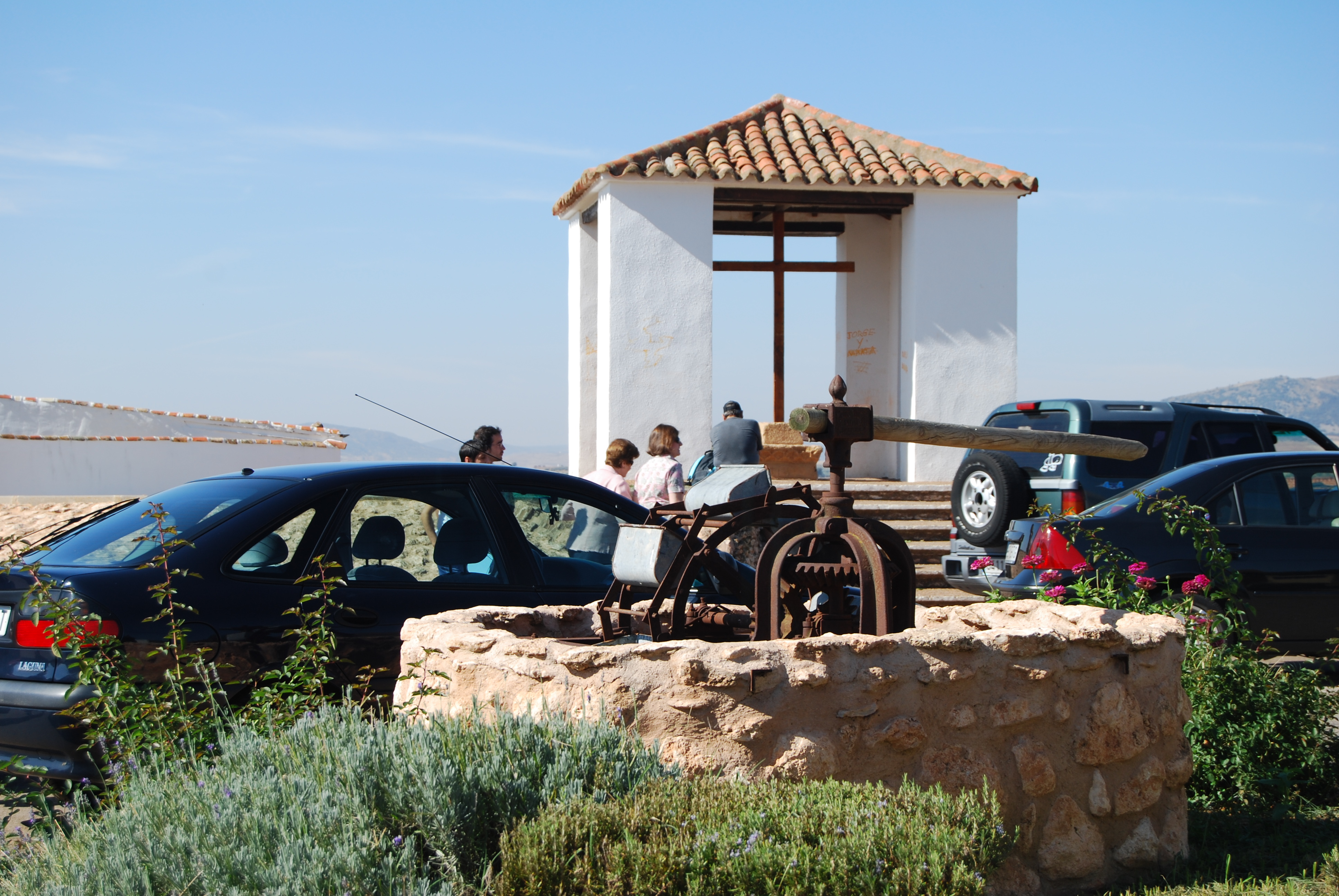 Es la cruz de la aldea El Cristo del Espiritu Santo